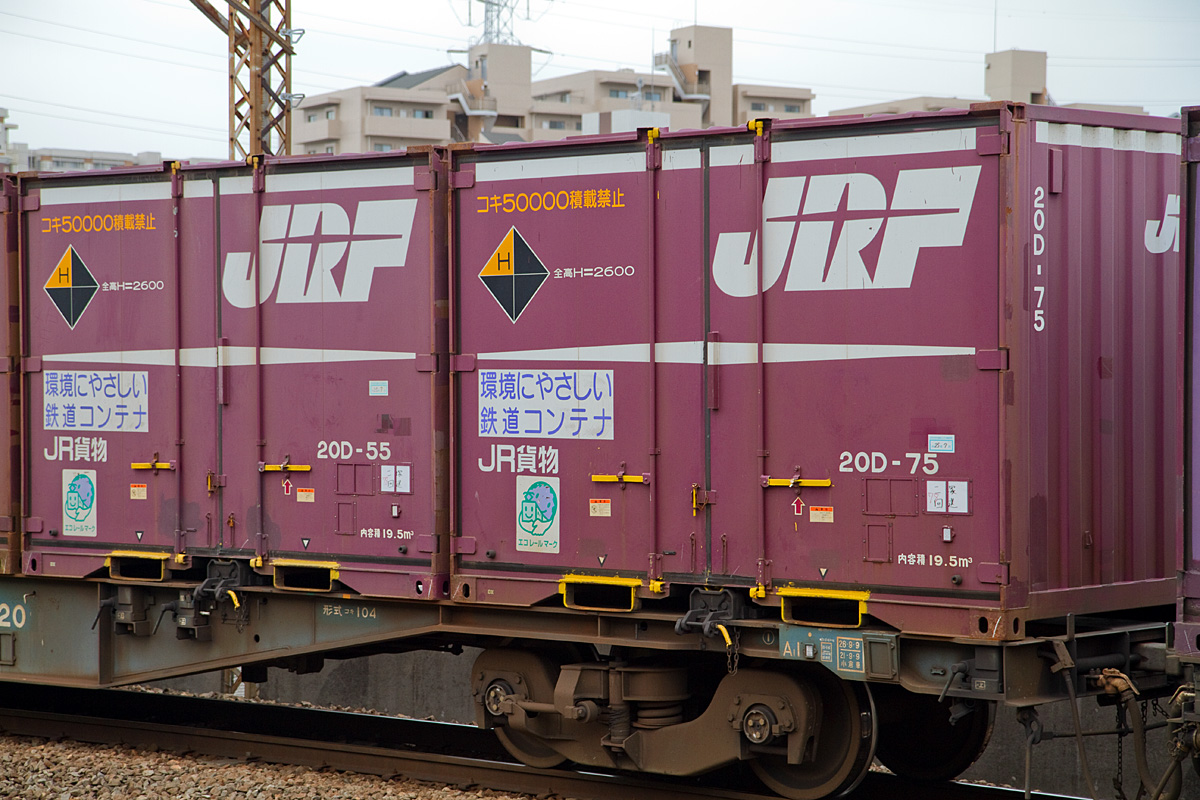 20Ｄコンテナ